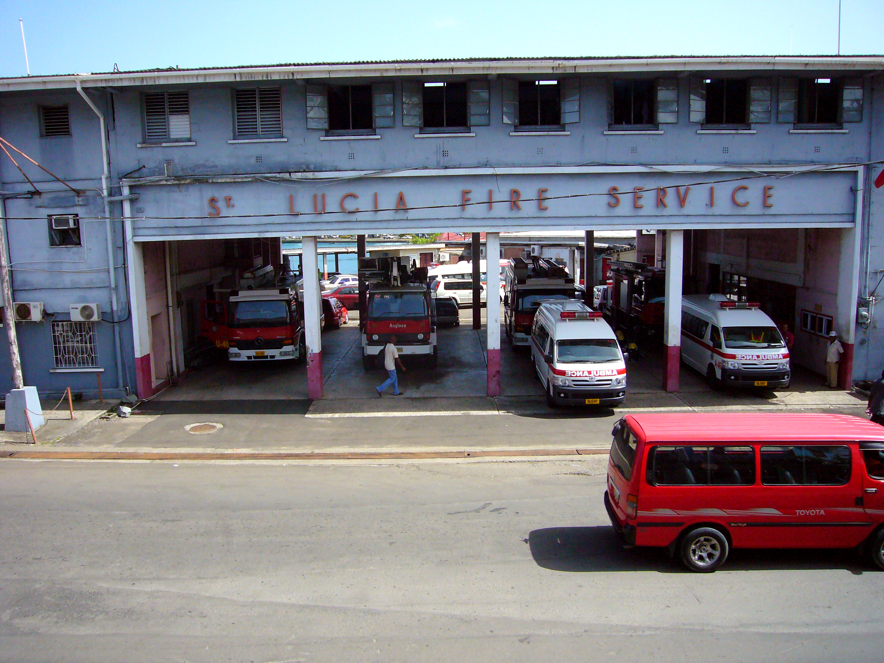 St. Lucia Fire Service